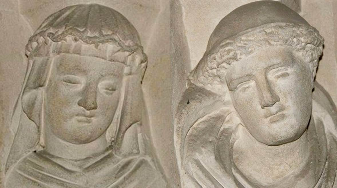 Fortuné et Thomasine Broquier, sculptures de la chapelle de La Royante, Aubagne, France 1870